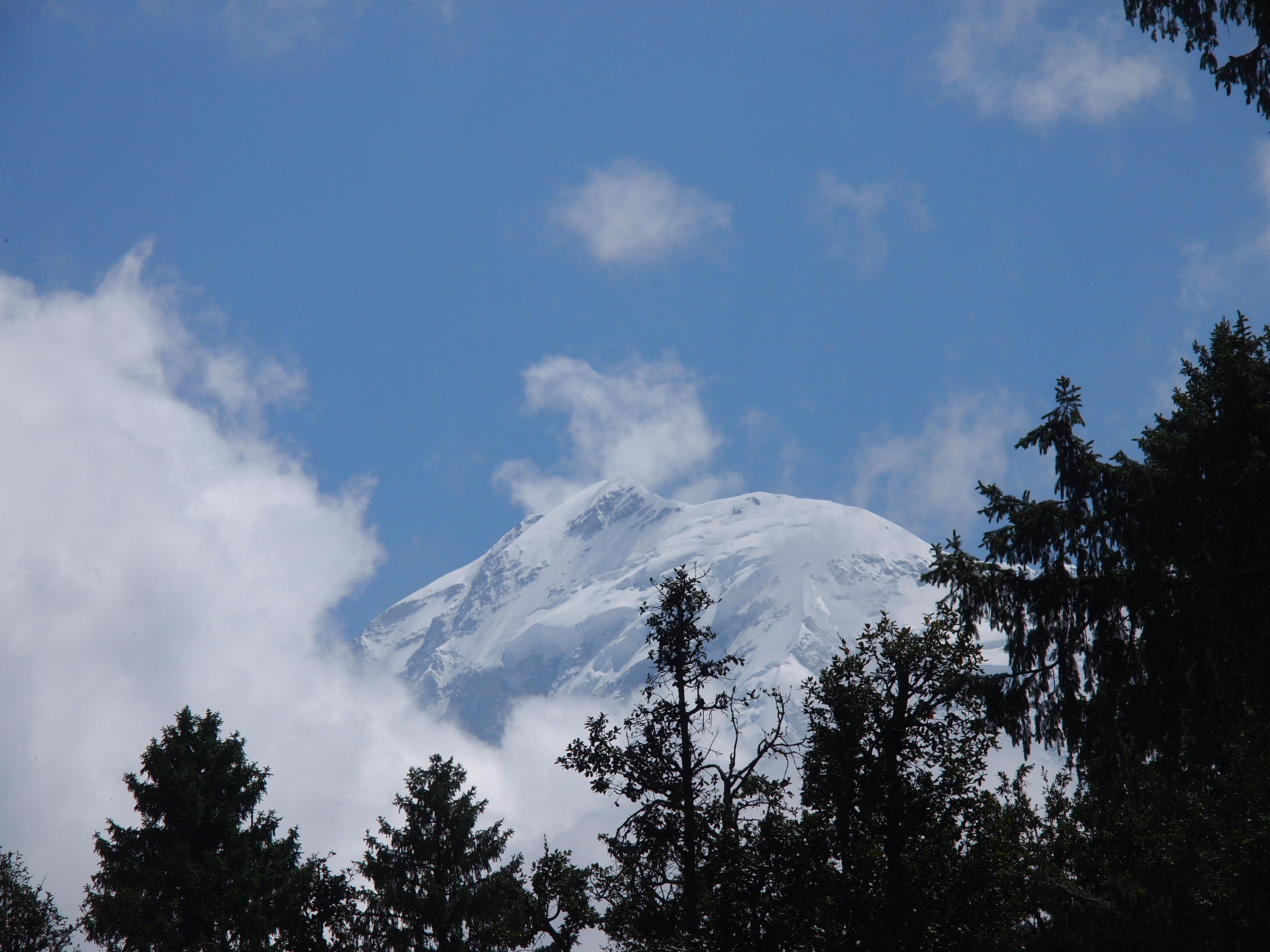 versante sud-ovest